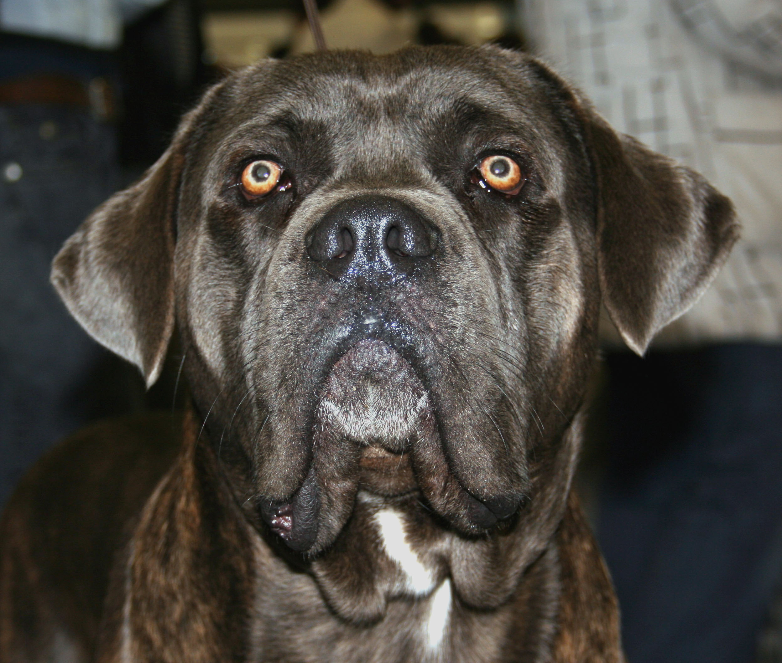 Tosa_inu na Światowej Wystawie Psów Rasowych w Poznaniu